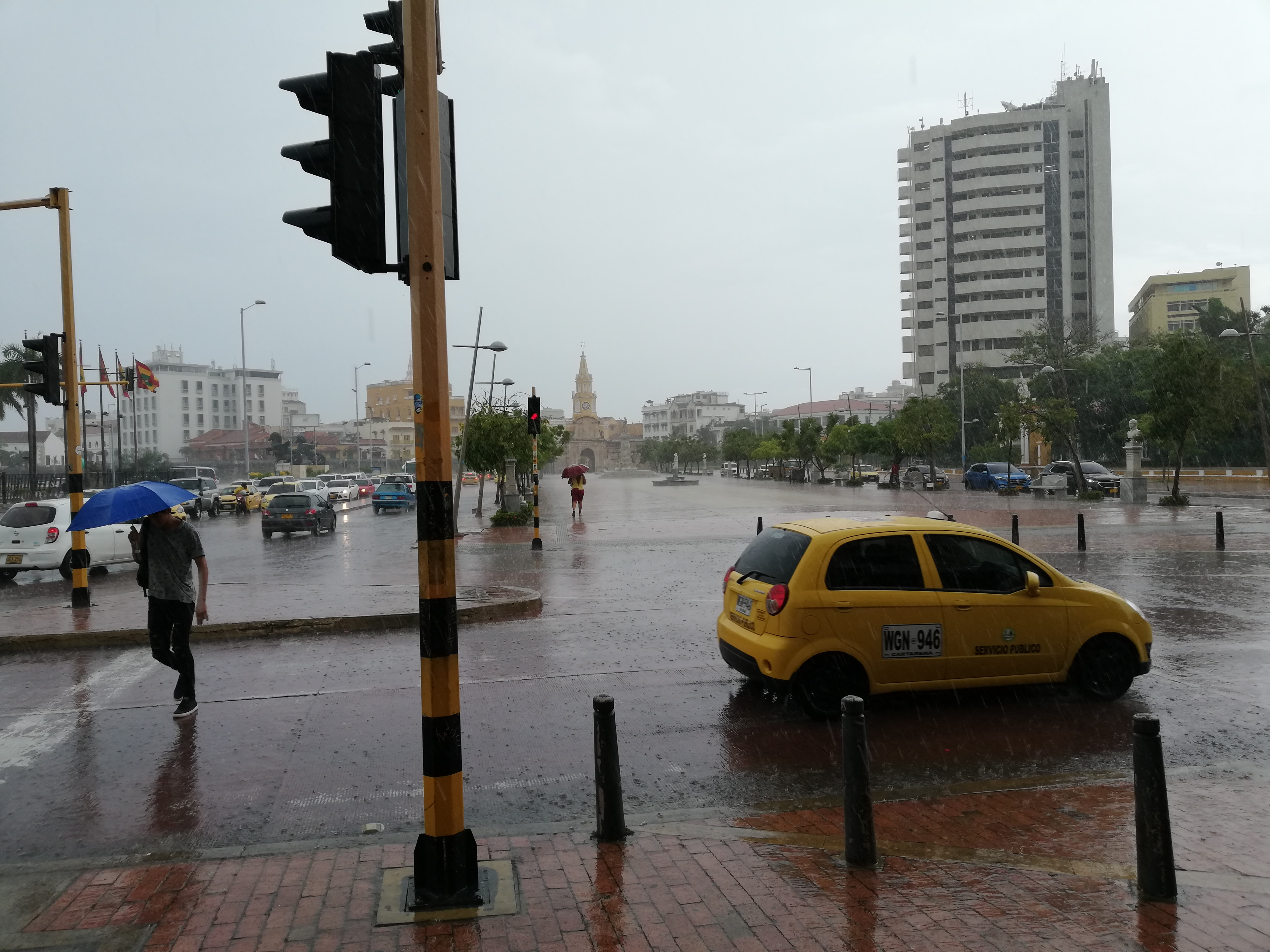 Veregnetes Cartagena im September